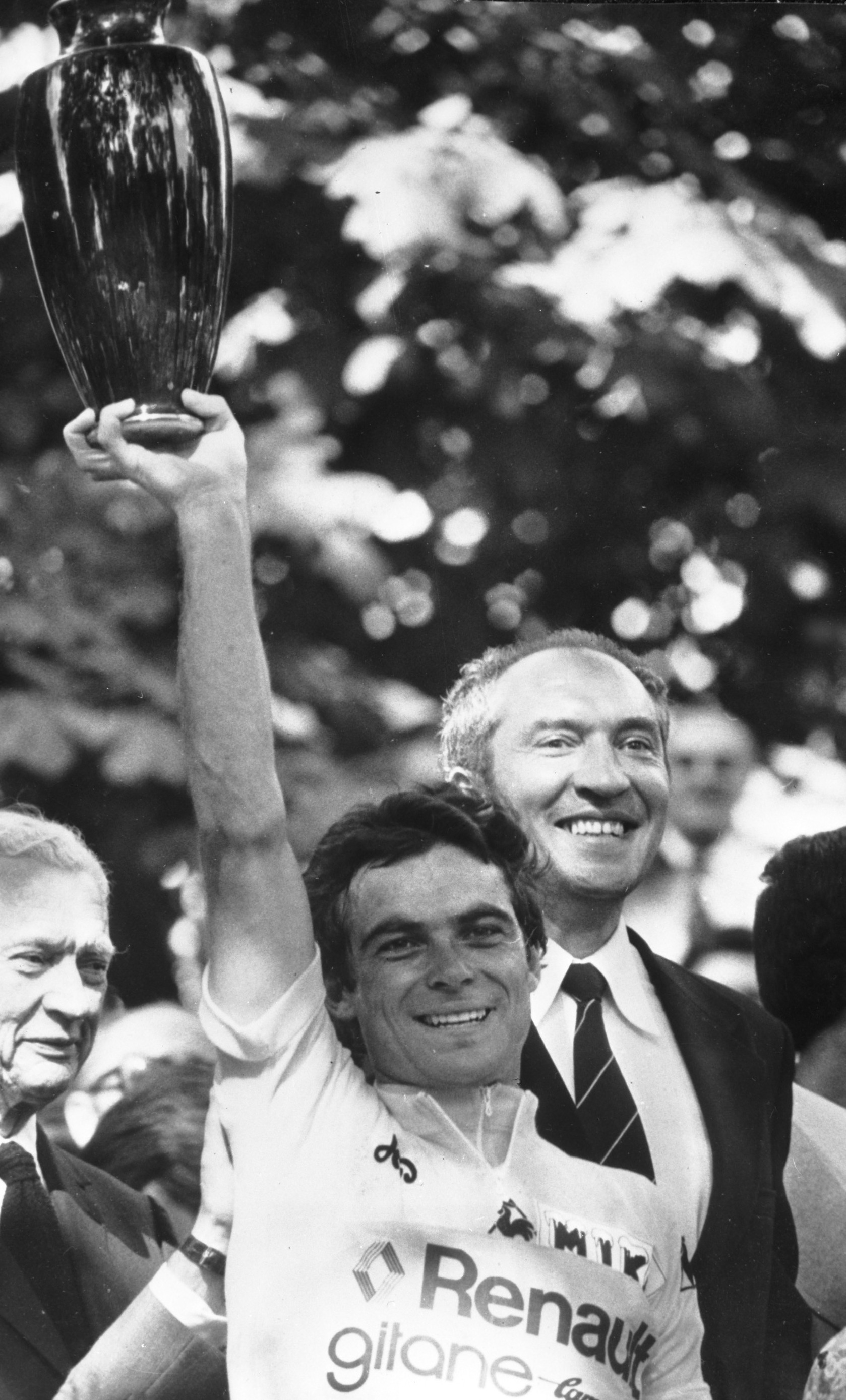 Bernhard Hinault tijdens huldiging Tour de France